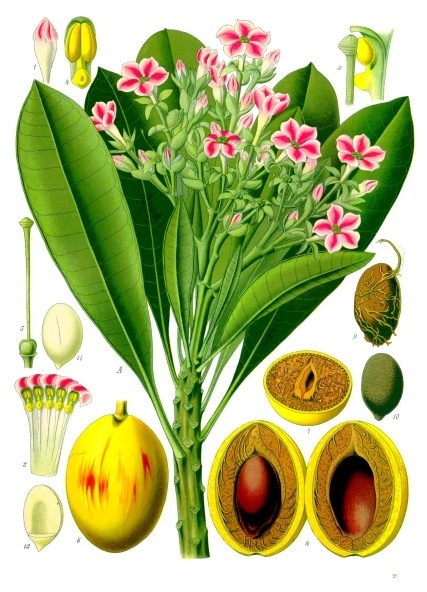 Gottesgerichtsbohne. A blühender Zweig. 1 Knospe; 2 Blumenkronenröhre aufgeschnitten; 3 Staubblatt und Narbe; 4 Staubblatt von vorn gesehen; 5 Pistill mit Griffel; 6 Frucht; 7 Querschnitt derselben; 8 Längsschnitt derselben; 9 Endokarp von der dem Korkgewebe anliegenden Seite; 10 Samen; 11 Kotyledonen von aussen, 12 dieselben von innen; einer derselben ist quergeschnitten. A 2/3 natürliche Grösse; 6, 7, 8, 9, 10 nahezu natürliche Grösse; 1, 2, 3, 4, 5 vergrössert.